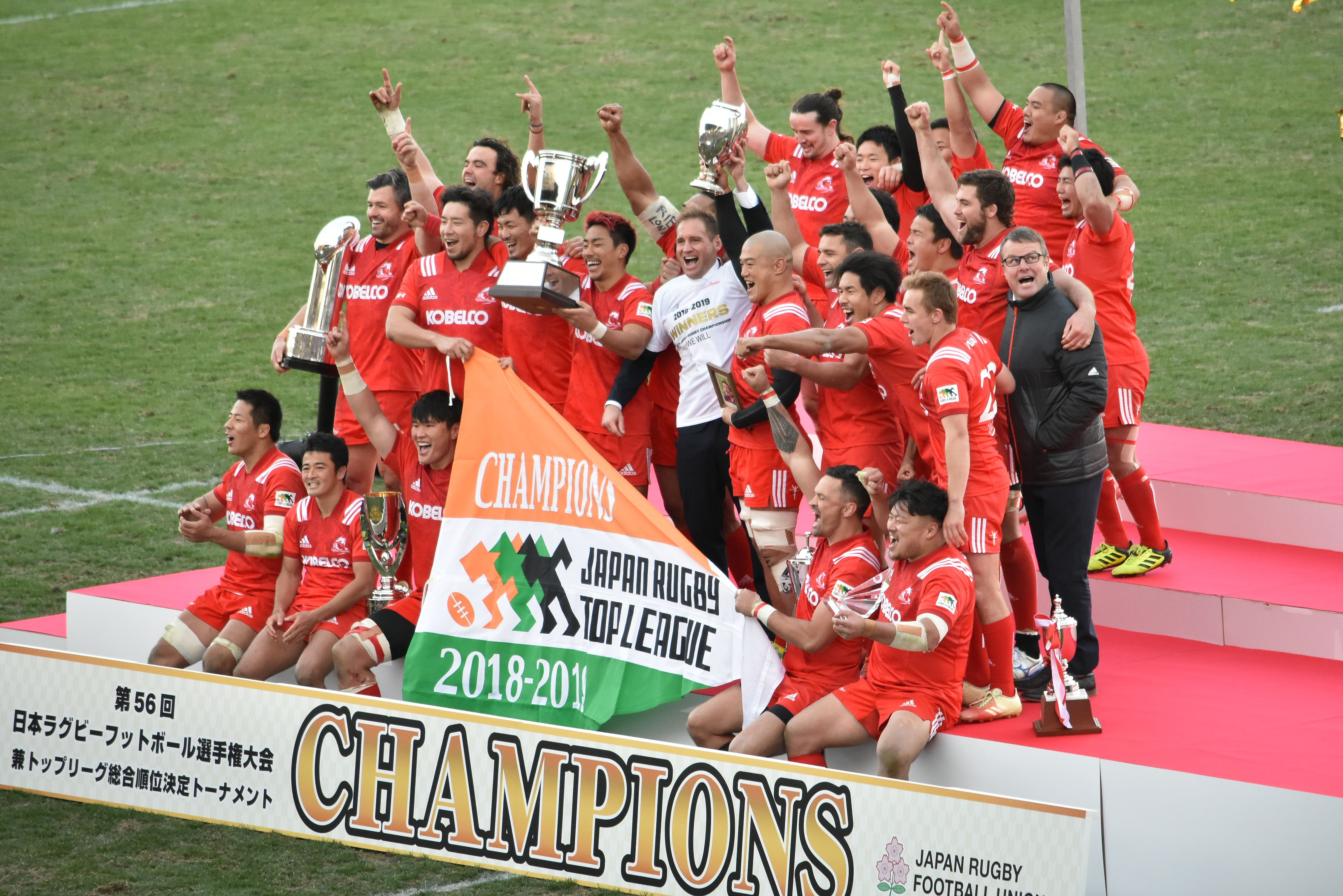 神戸製鋼コベルコスティーラーズ